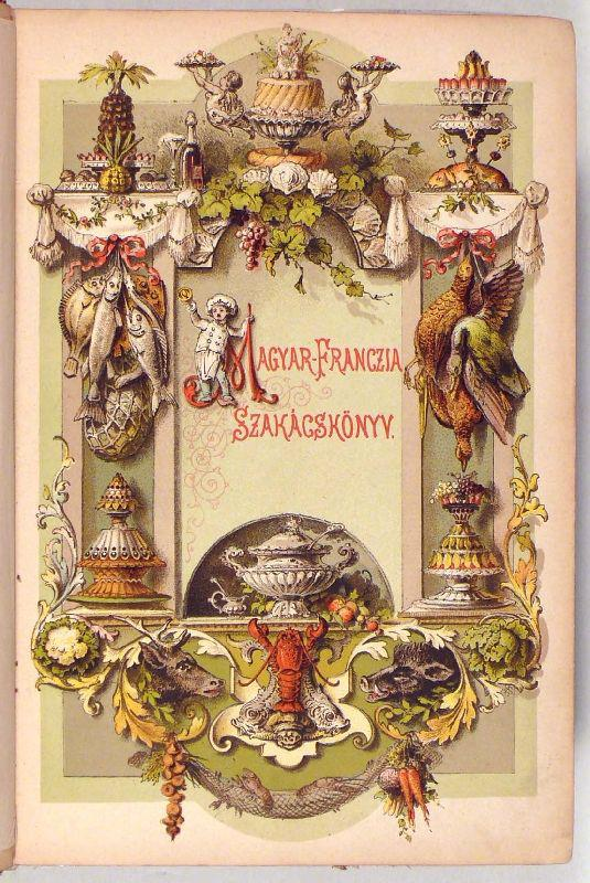 Dobos C. József : Magyar-franczia szakácskönyv borítója